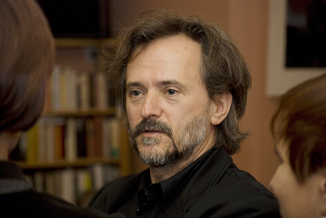 Włodzimierz Nowak. Lesung bei LesArt.Polska im Taranta Babu in Dortmund am 26.4.2012, Foto von Hartmut Salmen